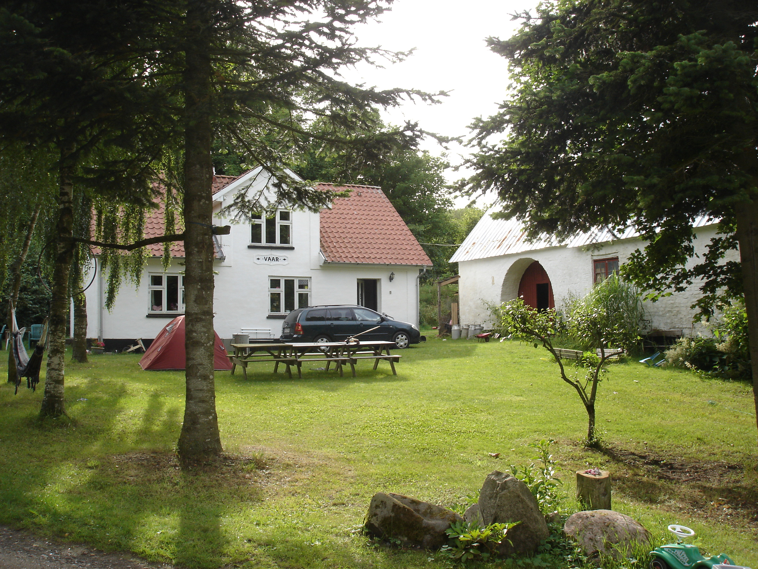 Waar Hovedgårds rejselade (th.) set fra SØ